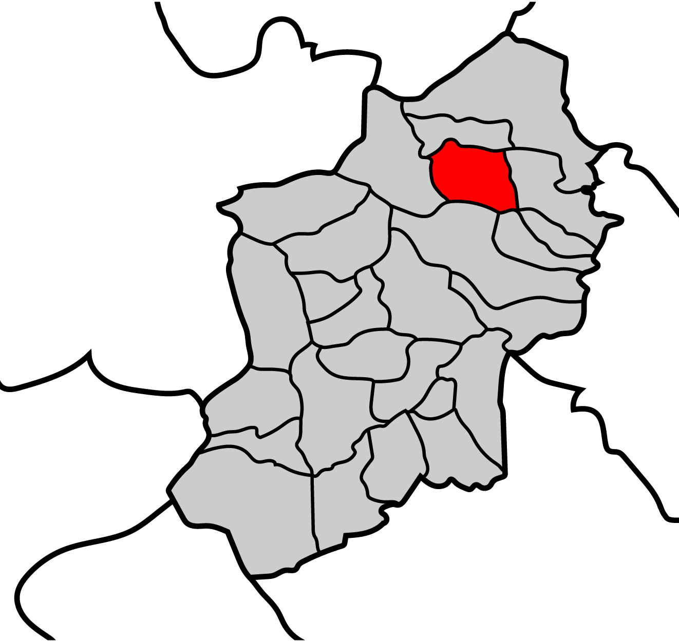 Mapa de la parroquia de Vilamane ayuntamiento de Becerreá